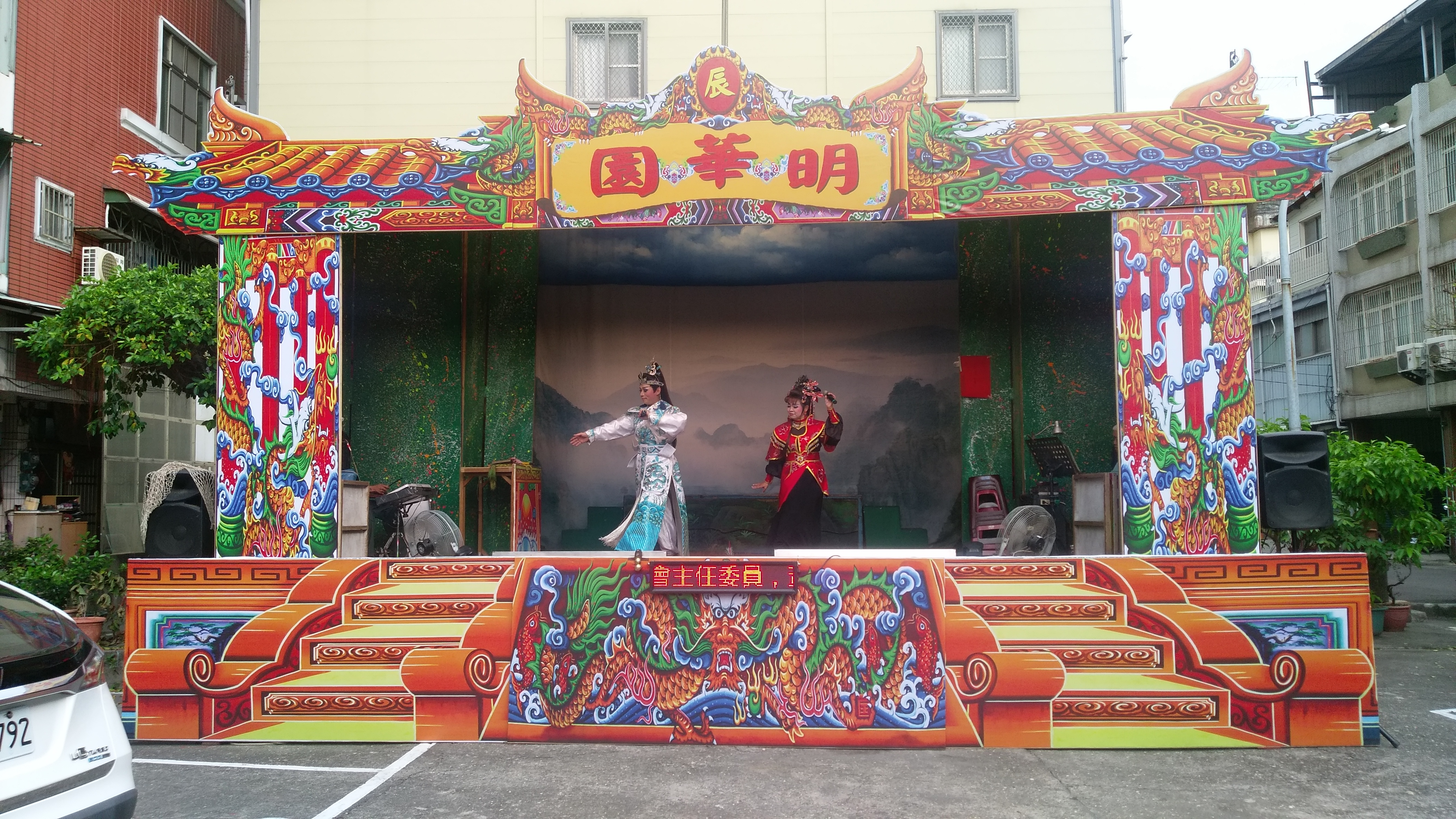 中文（台灣）: 明華園辰字團演出